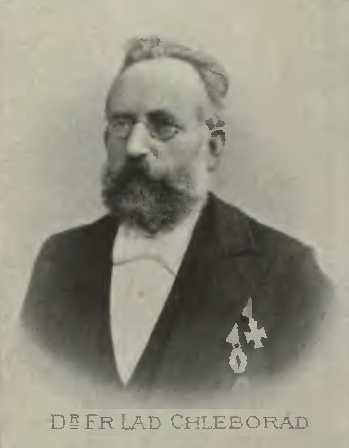 Portrét – František Ladislav Chleborád (1839 - 1911), Český národohospodář.